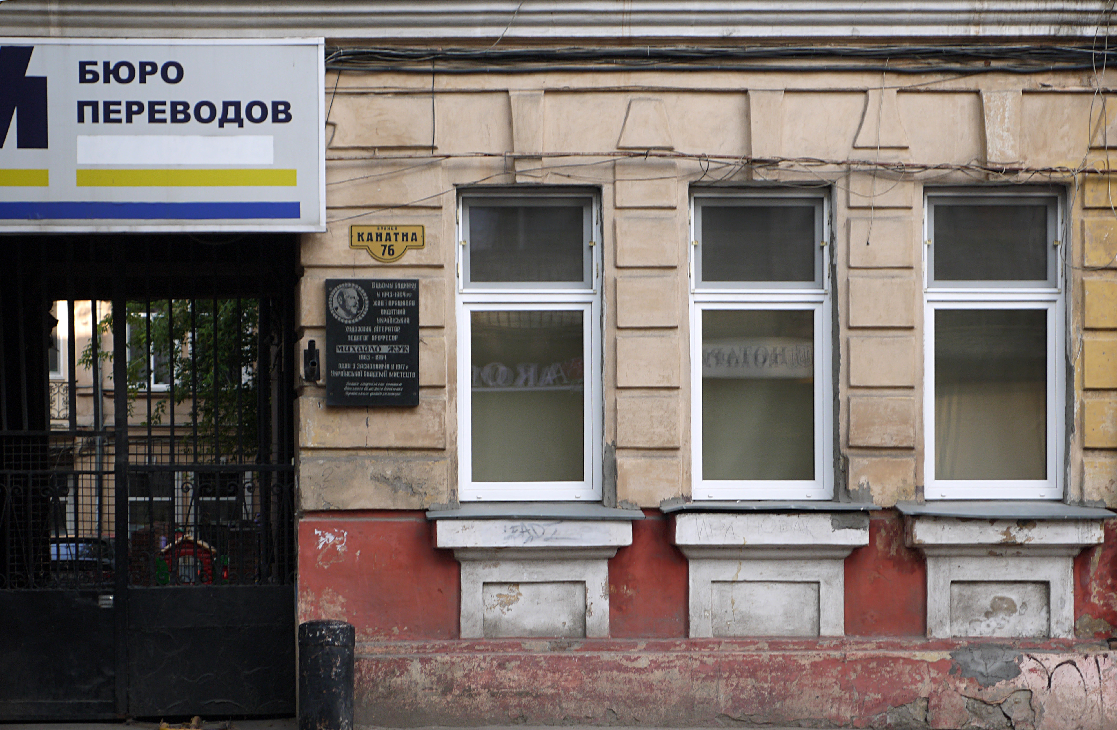 Будинок, в якому жив і працював М.І. Жук - український художник і поет, проф., Одеса, вул. Канатна, 76